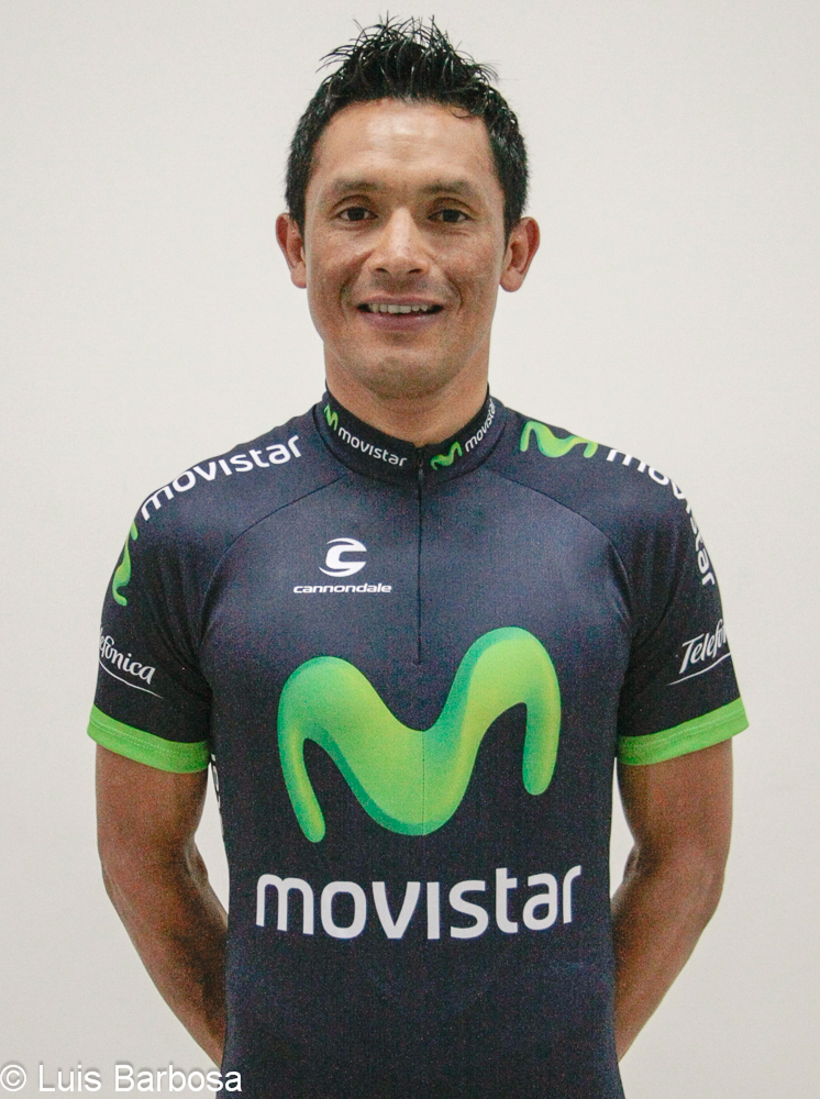 Photo officielle de Wilson Cepeda dans l'équipe Movistar Team America (saison 2013)